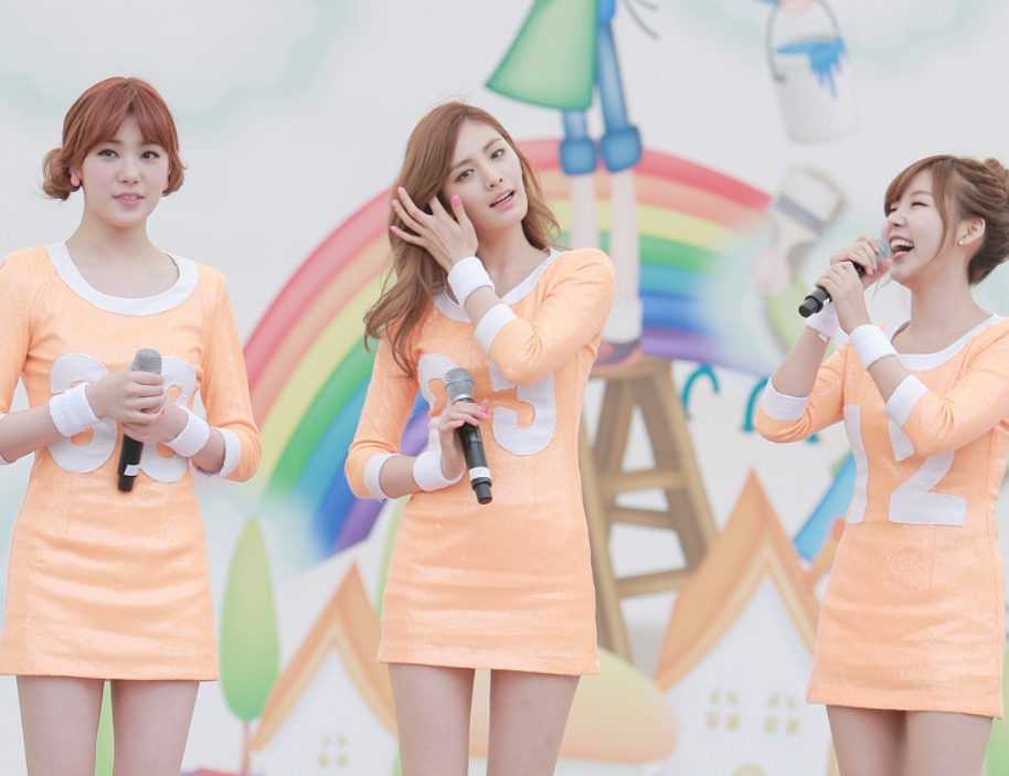 2013년 5월 6일 어린이대공원 꿈나무축제 가족그림소풍에서 오렌지 캬라멜.